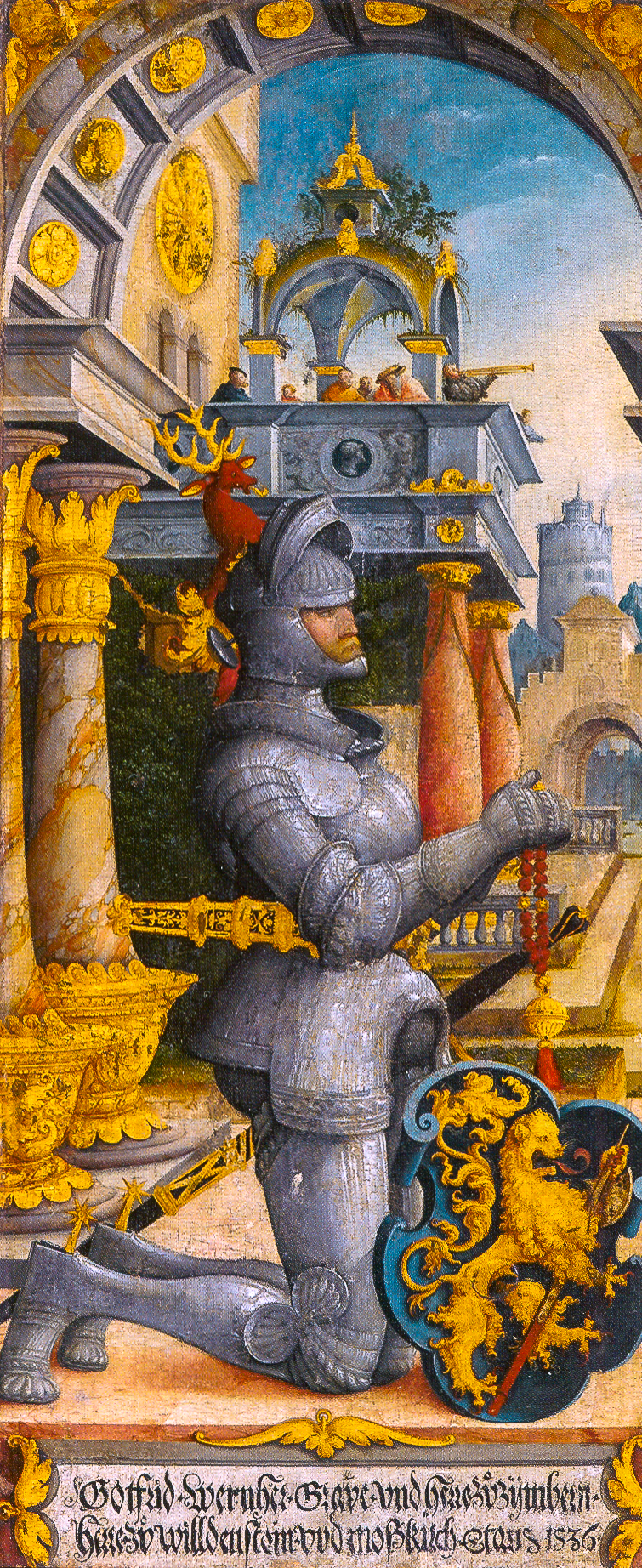 Der knienede Stifter Graf Gottfried Werner von Zimmern: Linker Drehflügel, geöffnet